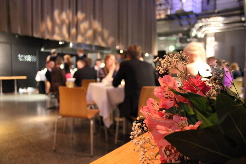 15-vuotisjuhlat vuonna 2013